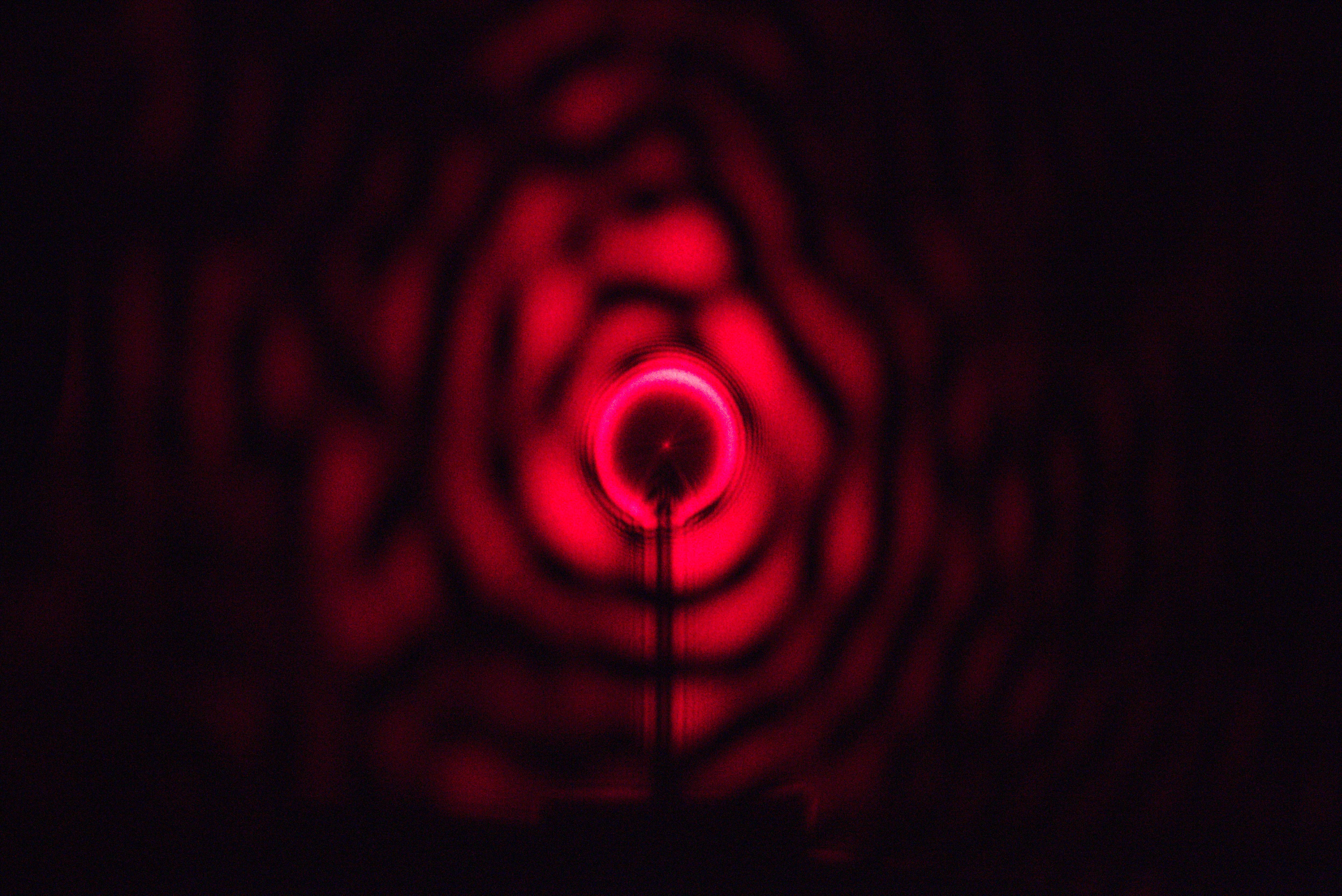 Mise en évidence de la tache de Fresnel. La source lumineuse est une diode laser rouge suivit d'un sténopé assez petit pour diffracter la lumière et ainsi homogénéiser la tache laser. L'objet éclairé est une bille d'airsoft opaque montée sur une tête d'épingle.